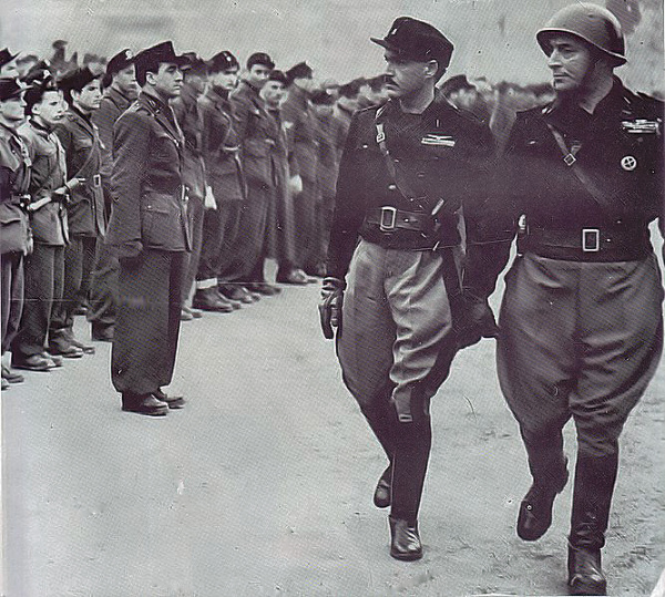 Alessandro Pavolini e Vincenzo Costa passano in rassegna gli squadristi delle Brigate nere della Resega. Milano, Dicembre 1944